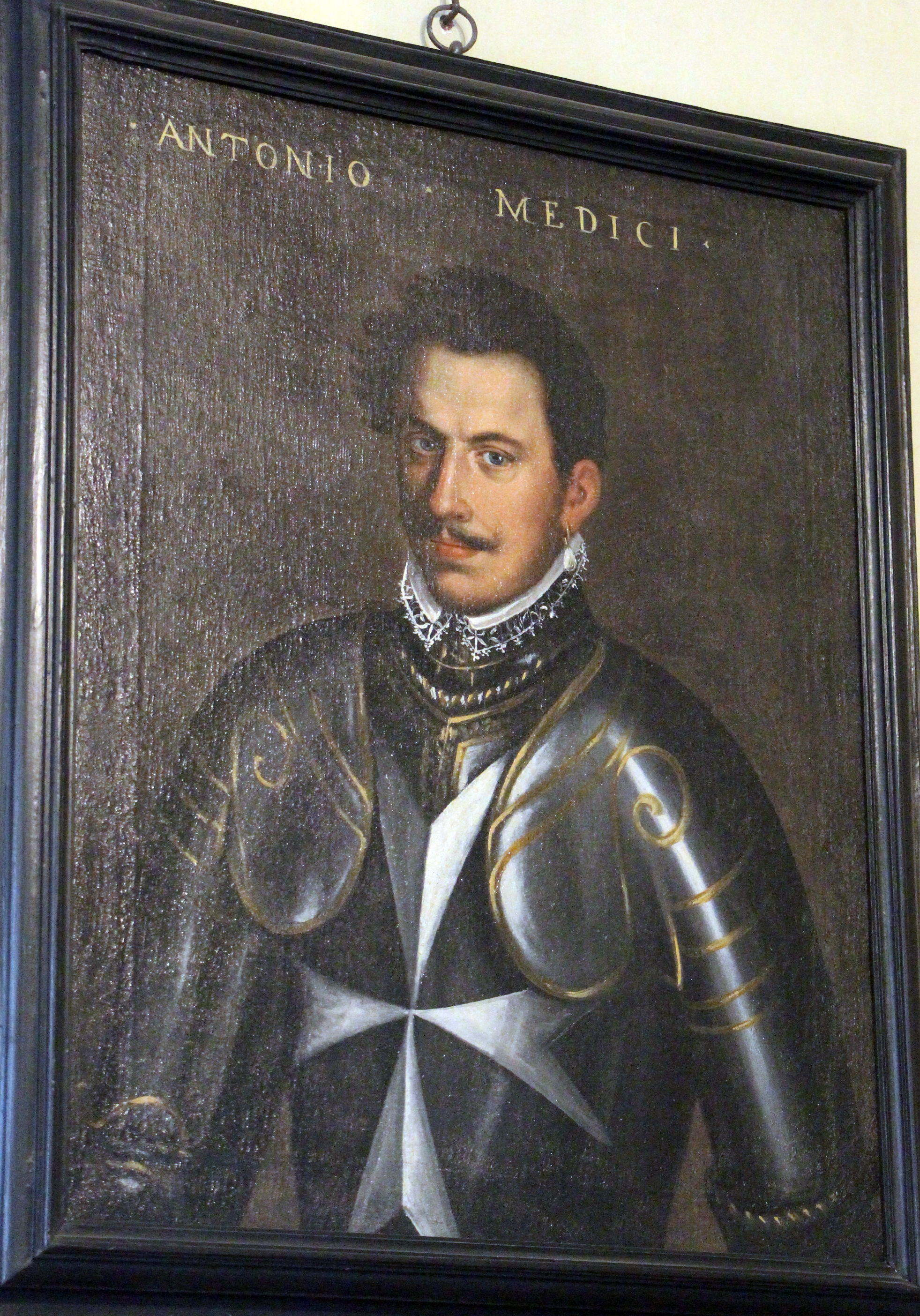 Villa medicea di Cerreto Guidi - MIBAC The making of this document was supported by Wikimedia CH. (Submit your project!) For all the files concerned, please see the category Supported by Wikimedia CH. This is a photo of a monument which is part of cultural heritage of Italy.